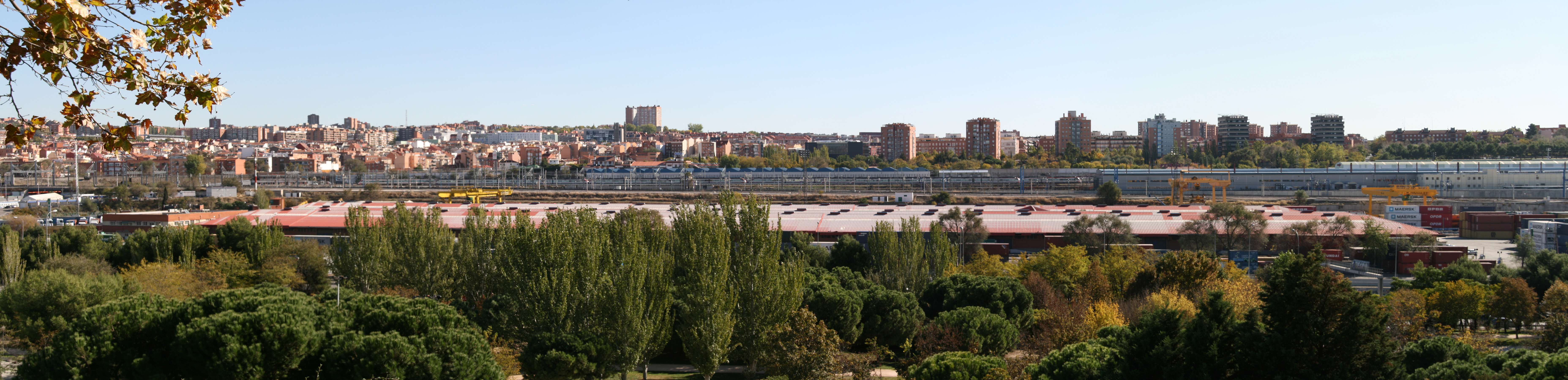 Vista panorámica de la estación de Abroñigal (Madrid) desde el cerro de la Plata en el parque Enrique Tierno Galván